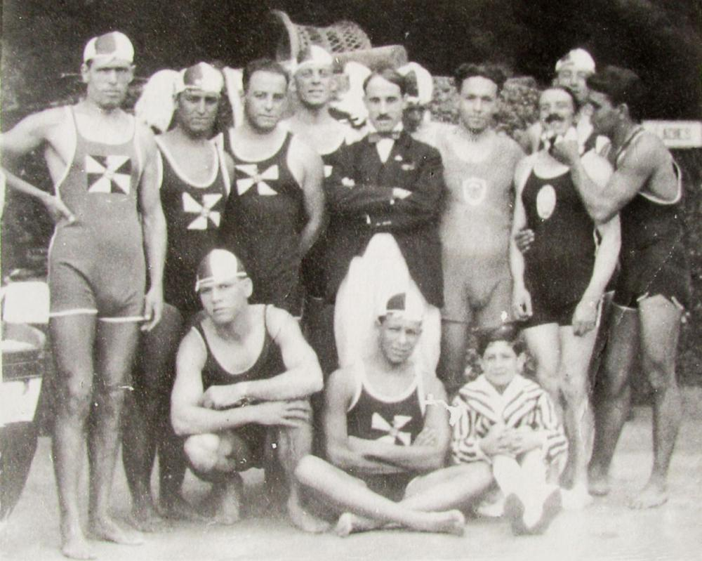 Joaquim Quintino Travassos Lopes, presidente do Club Sport Marítimo, com uma selecção de nadadores de Lisboa. Angústias, Funchal, 1924. Colecção Club Sport Marítimo.